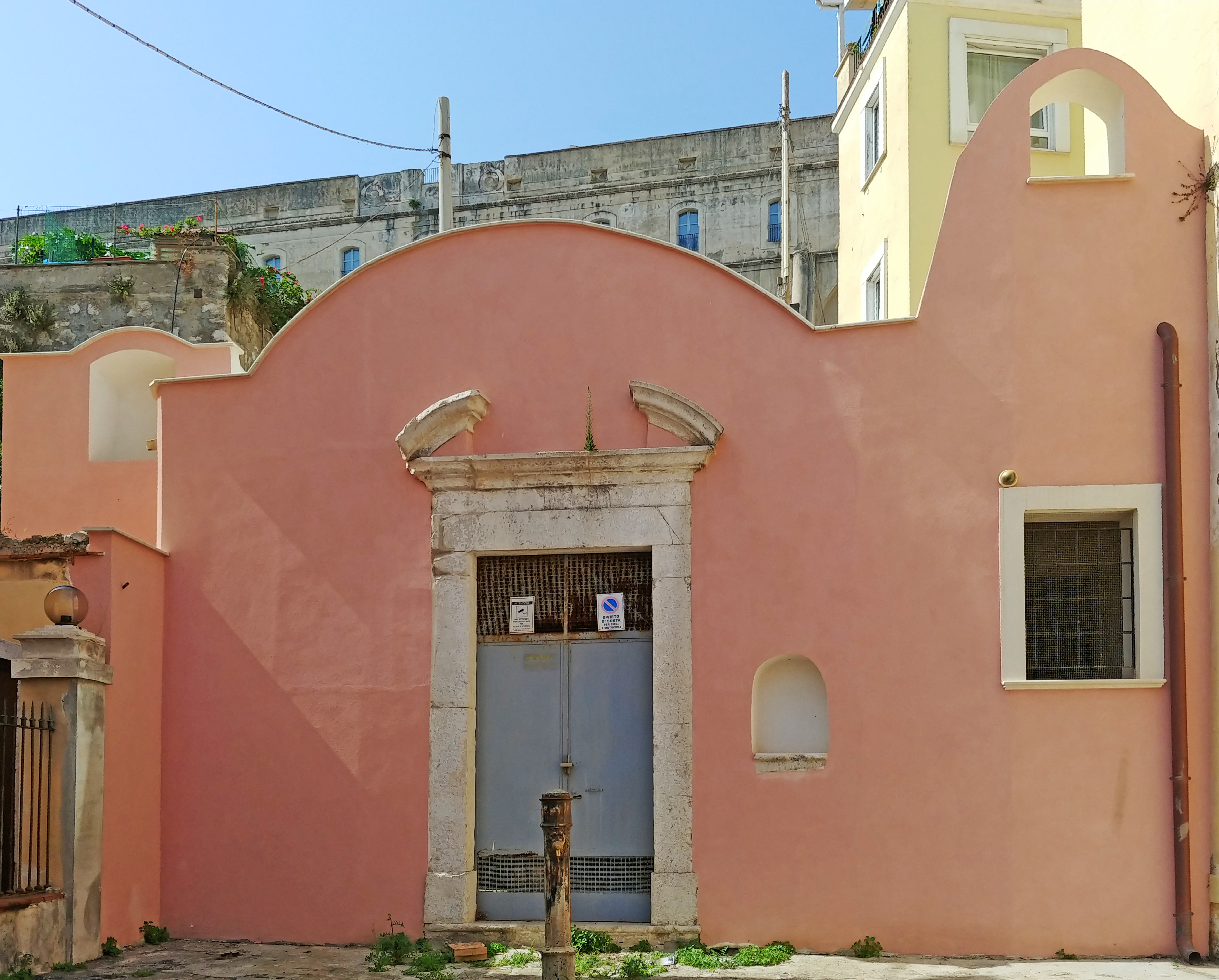 Esterno.